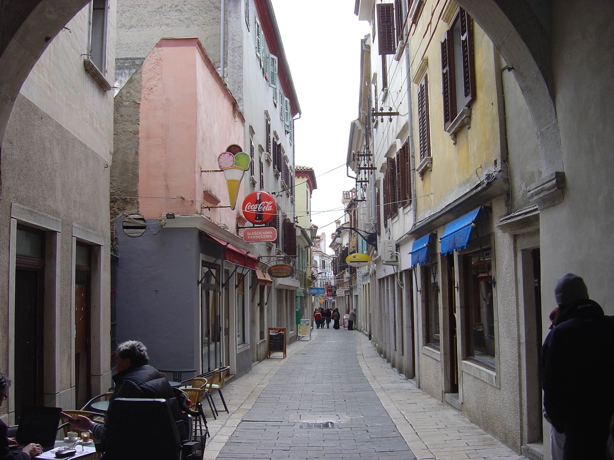 Koper, Slovenia